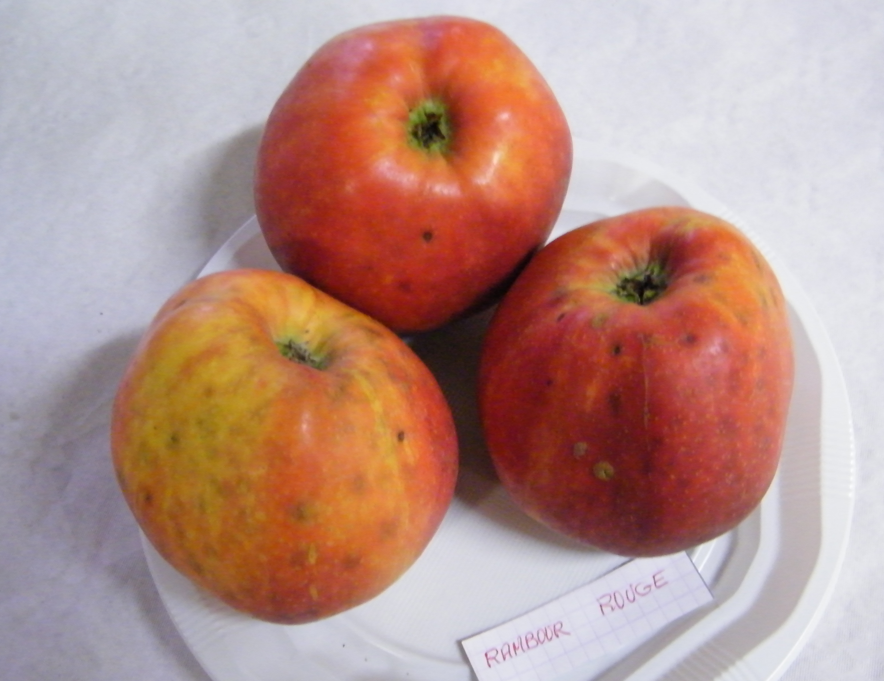 Rambour Rouge, Mons-Boubert, Somme, Fr